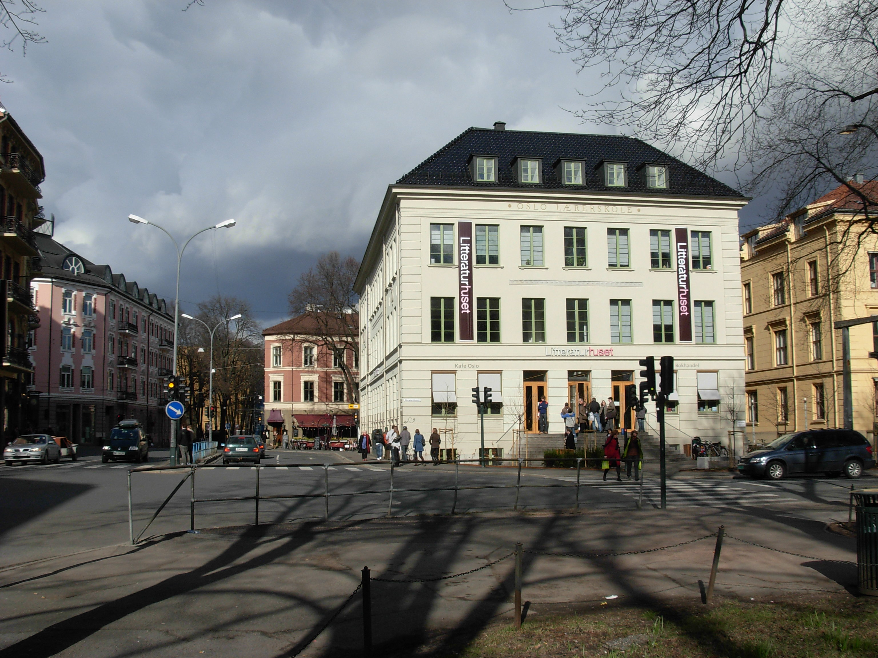 Litteraturhuset, Oslo